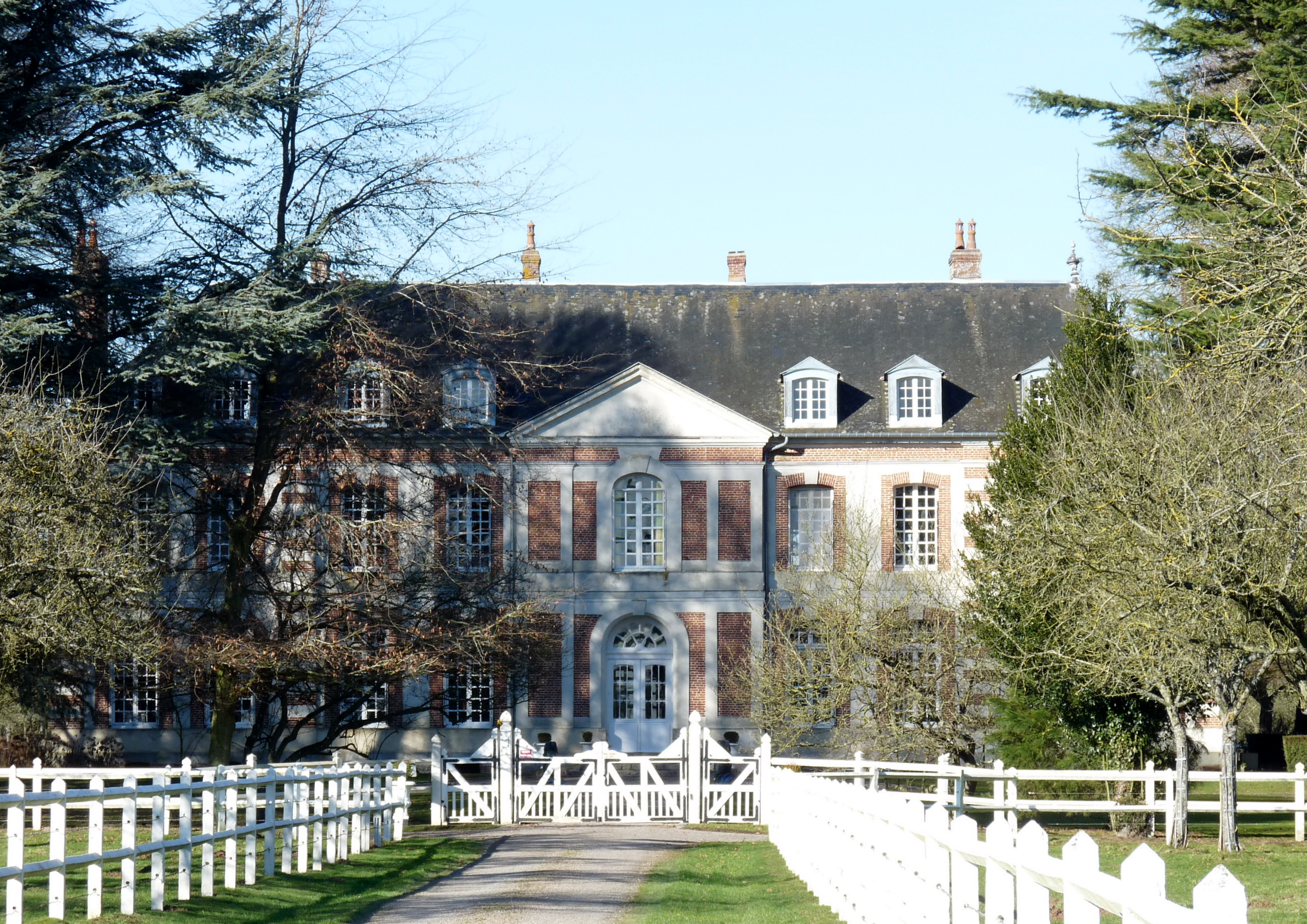 Chateau de saint mards de fresne